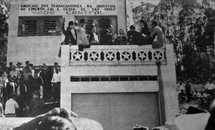 Assembleia realizada no Sindicato dos Trabalhadores na Indústria de Cimento de São Paulo em agosto de 1962, diante da greve na Cimento Perus